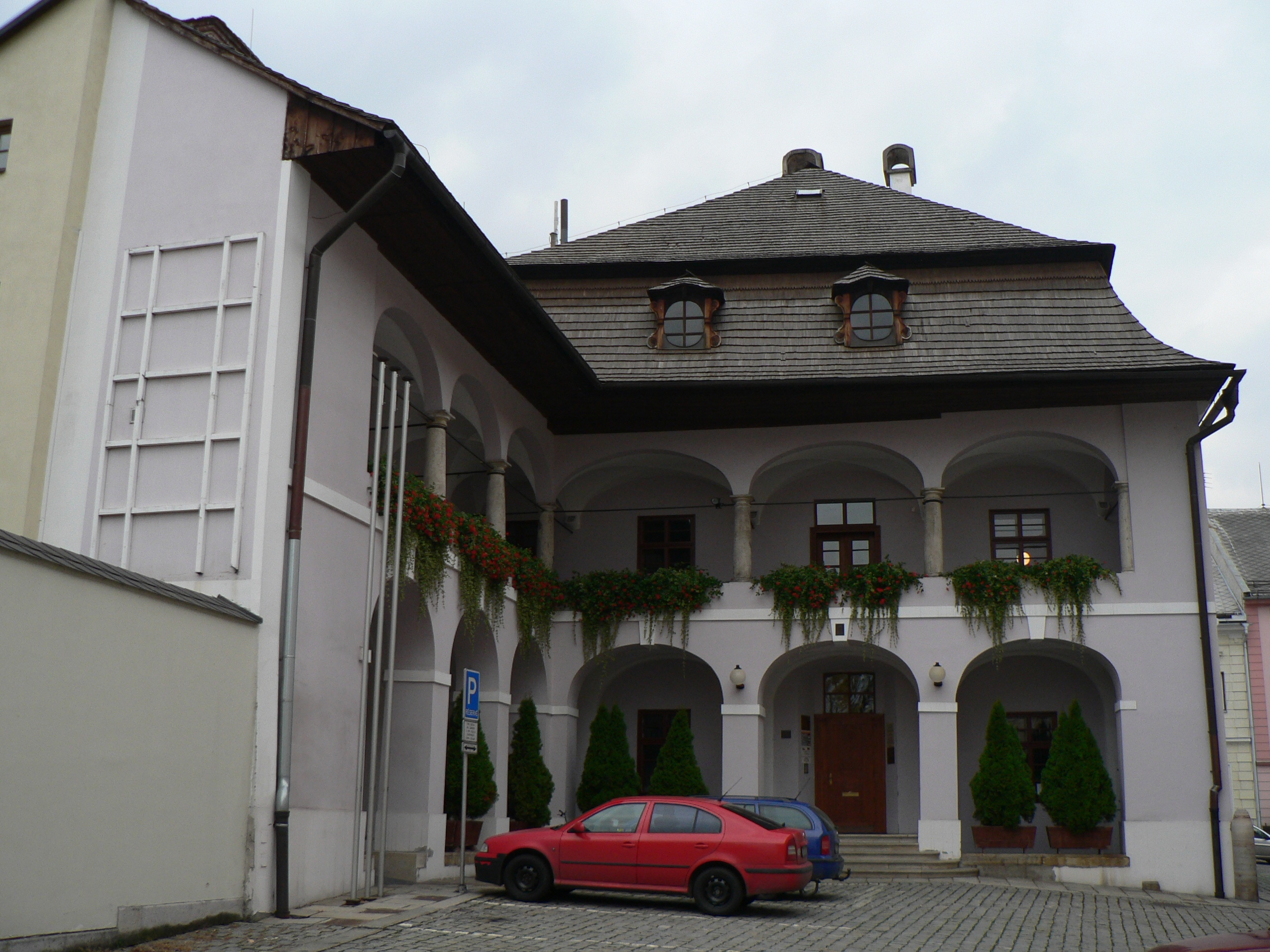 Pozdně barokní Geschaderův dům v Šumperku z roku 1782.